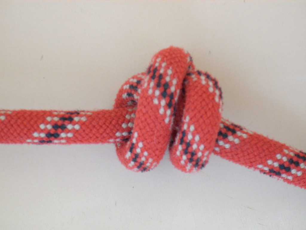 Doppelter Überhandknoten als Stopper